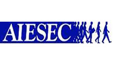 Logo AIESEC